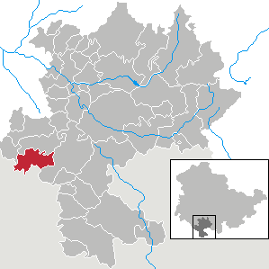 Milz in Thuringia - district Hildburghausen